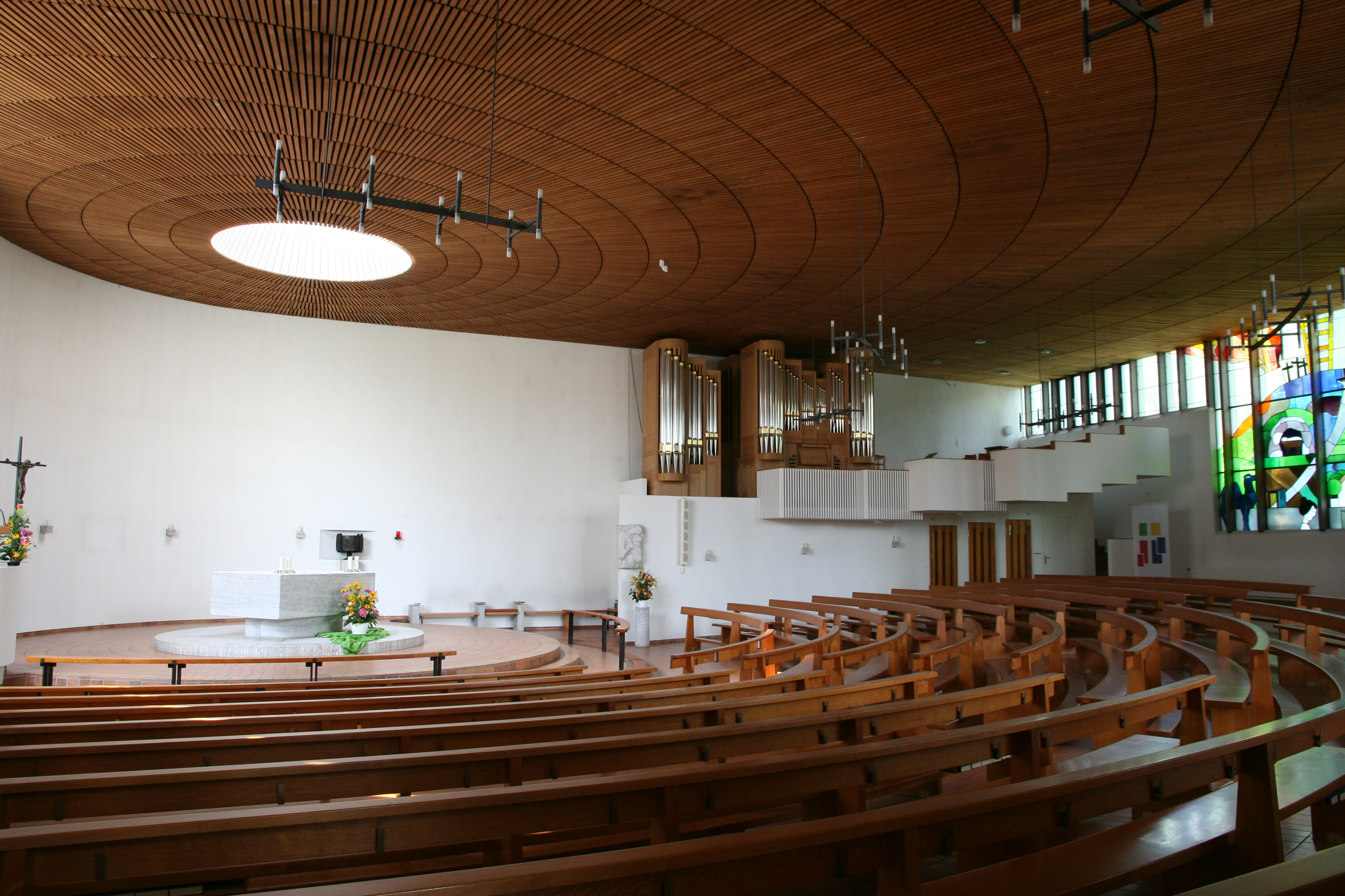 Römisch-katholische Pfarrkirche St. Christophorus Wangen an der Aare